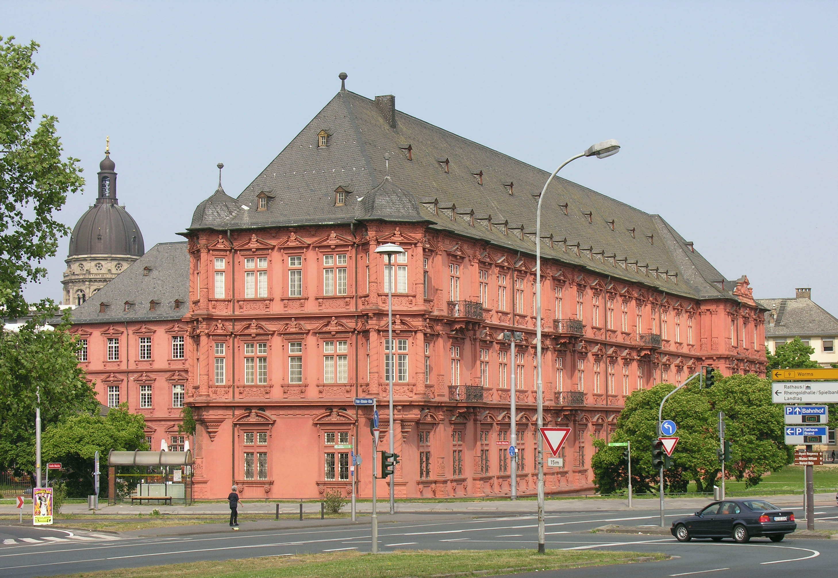 das Kurfürstliche Schloss zu Mainz an der Rheinallee Foto von Südost 2007 Wolfgang Pehlemann Wiesbaden DSCN1327